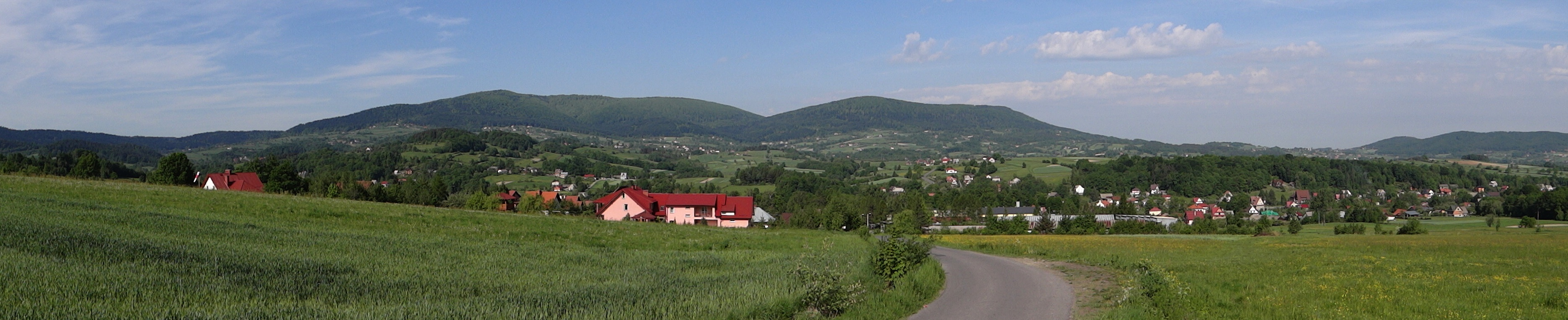 Wiśniowa, widok ogólny